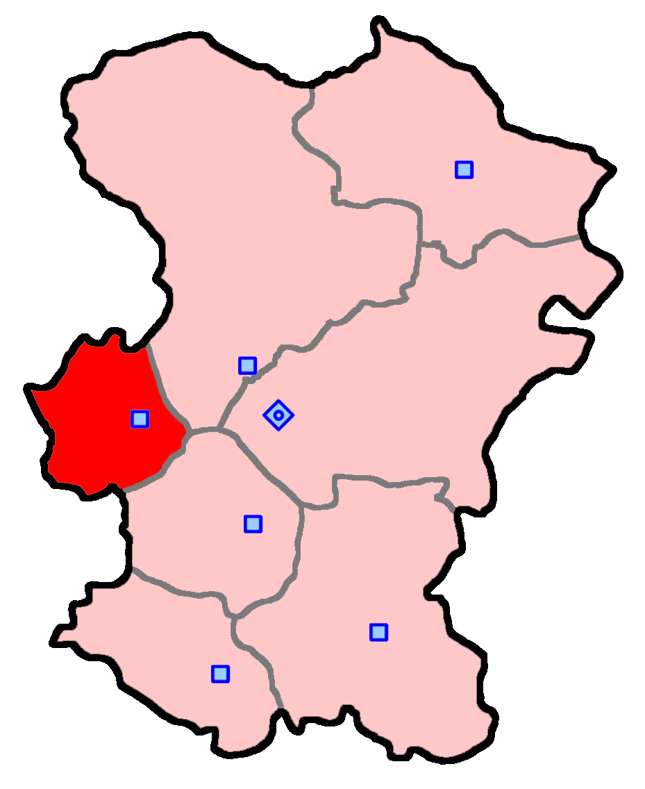 حوزهٔ انتخاباتی اسدآباد برای انتخابات مجلس شورای اسلامی